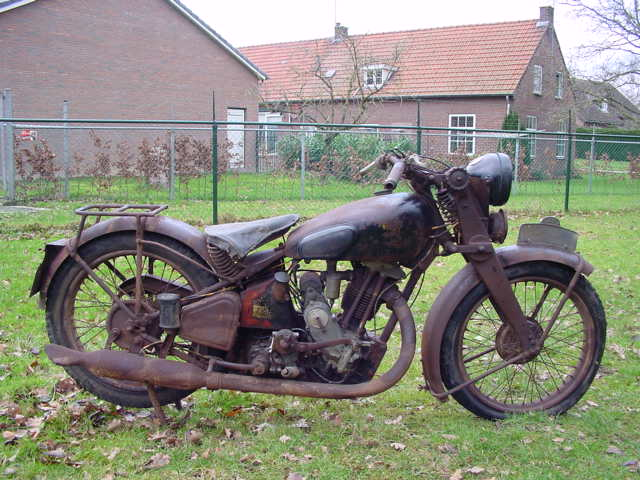 Toestemming van Yesterdays Antique Motorcycles (